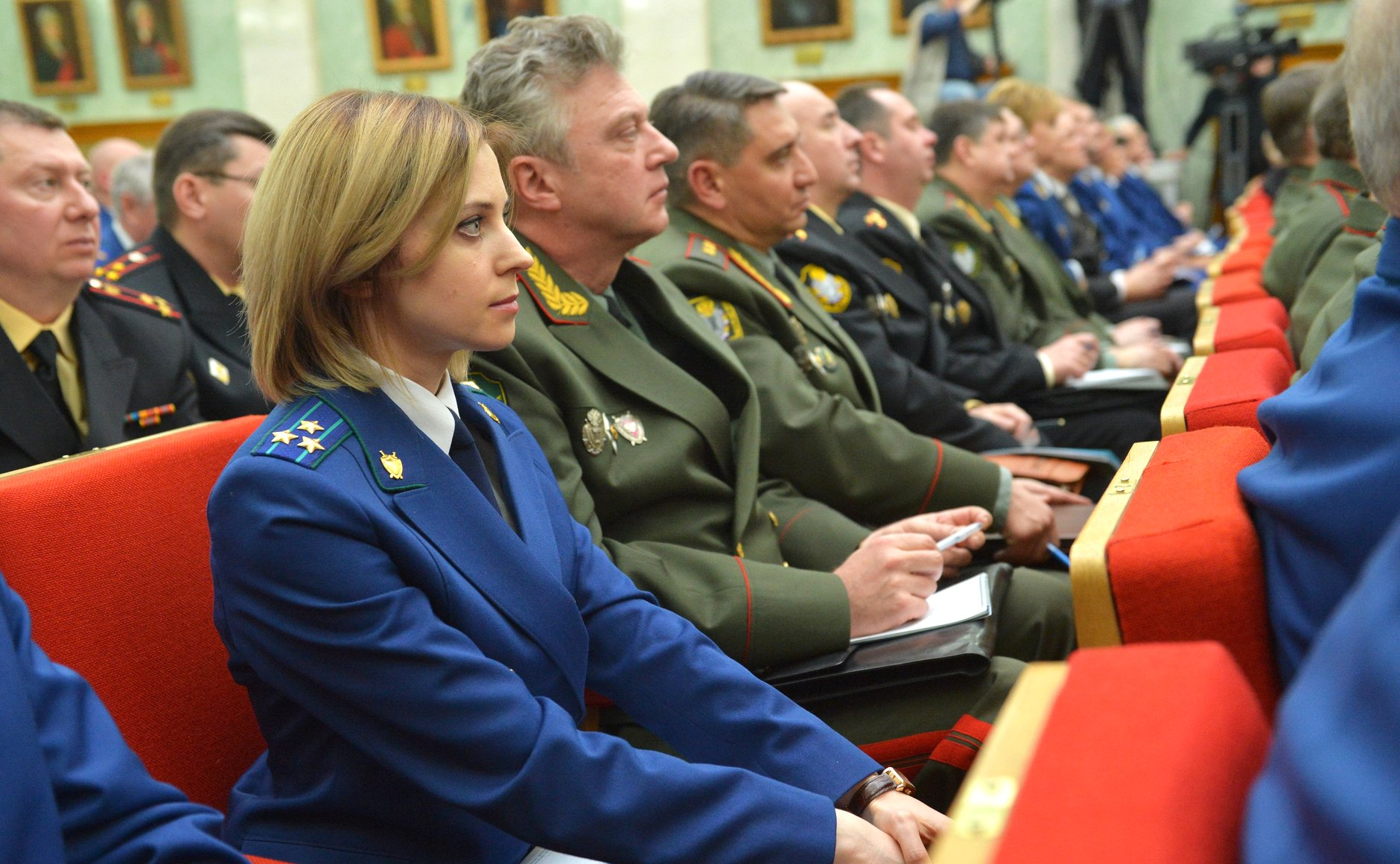 Прокурор Крыма Наталья Владимировна Поклонская на расширенной коллегии Генпрокуратуры России